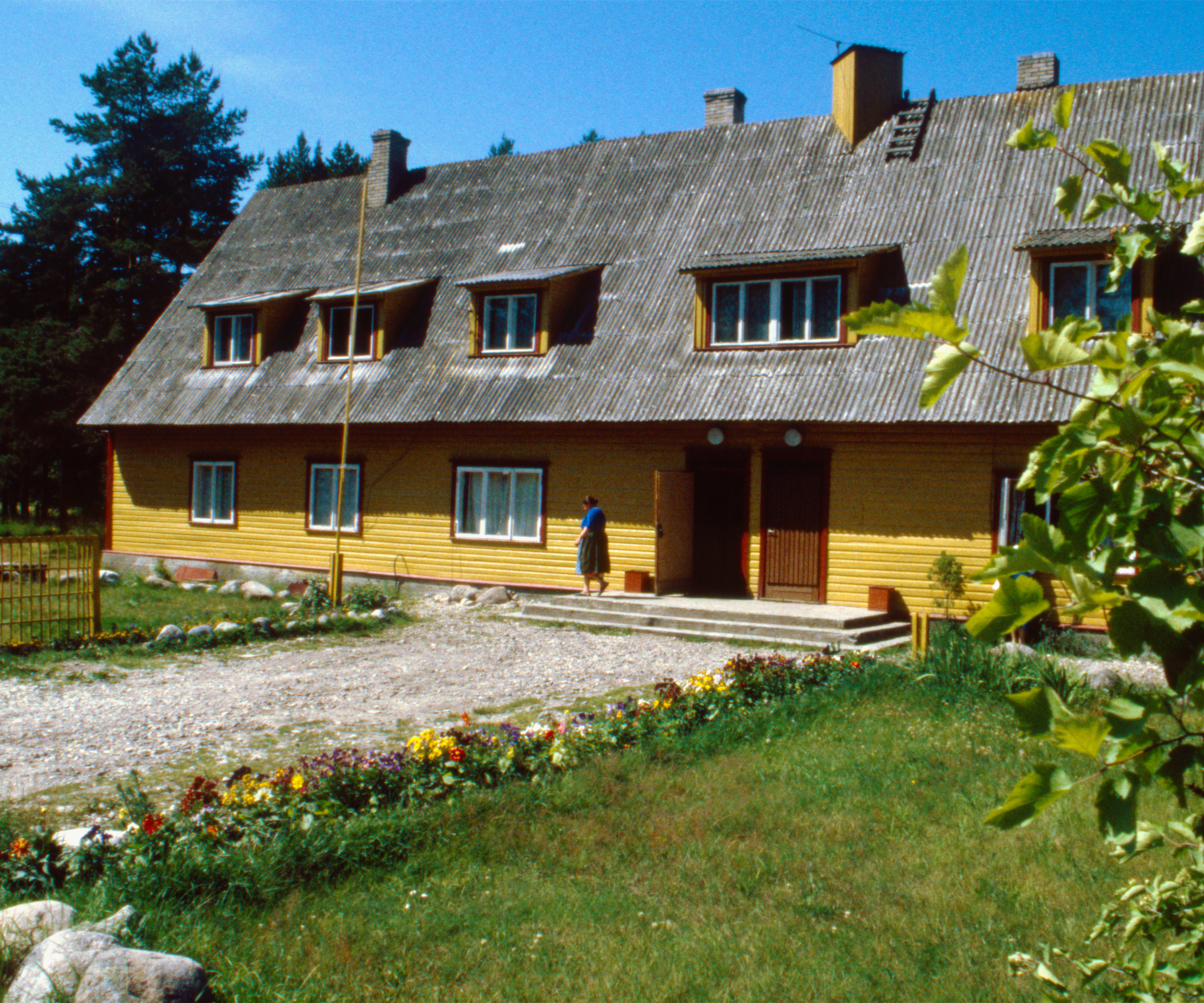 Kihnu vana rahvamaja